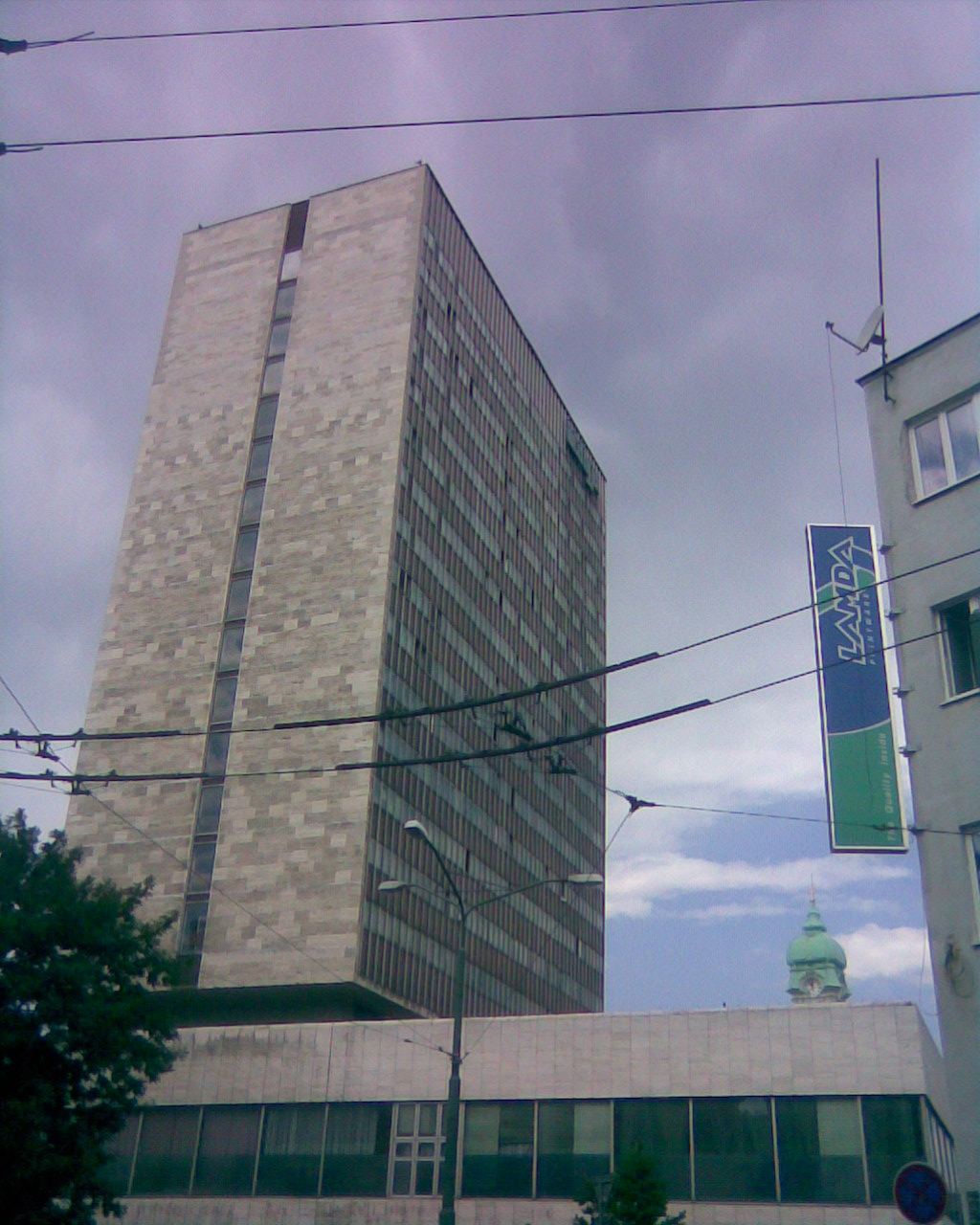 Hotel Kyjev